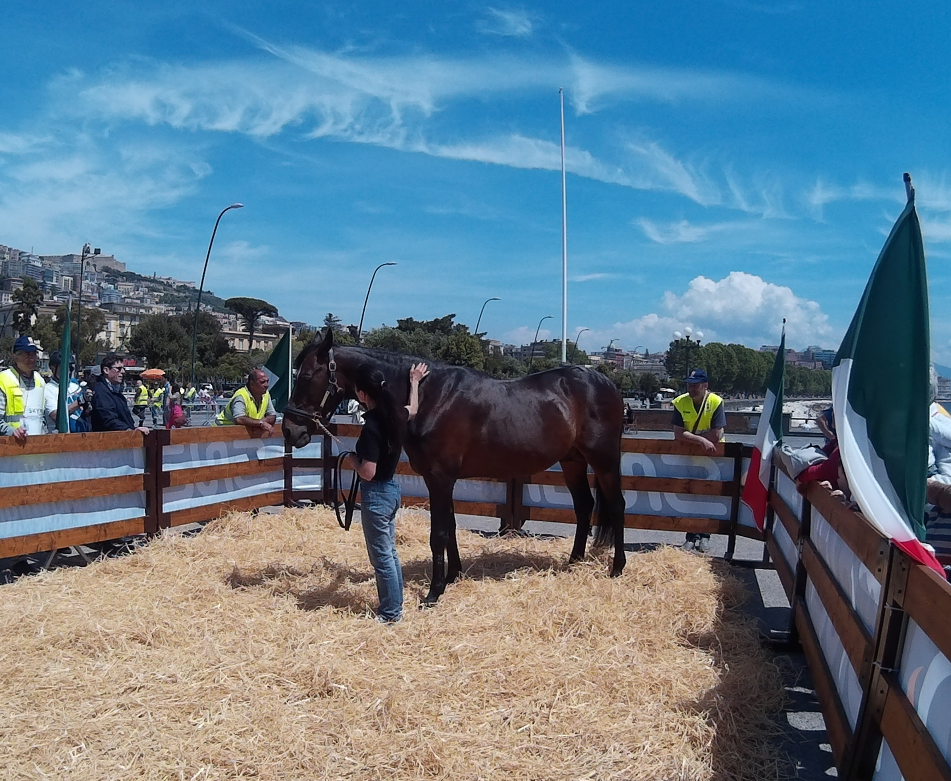 Il cavallo Varenne mostrato a via Caracciolo (Napoli) per promuovere la stagione di corse all'ippodromo di Agnano.